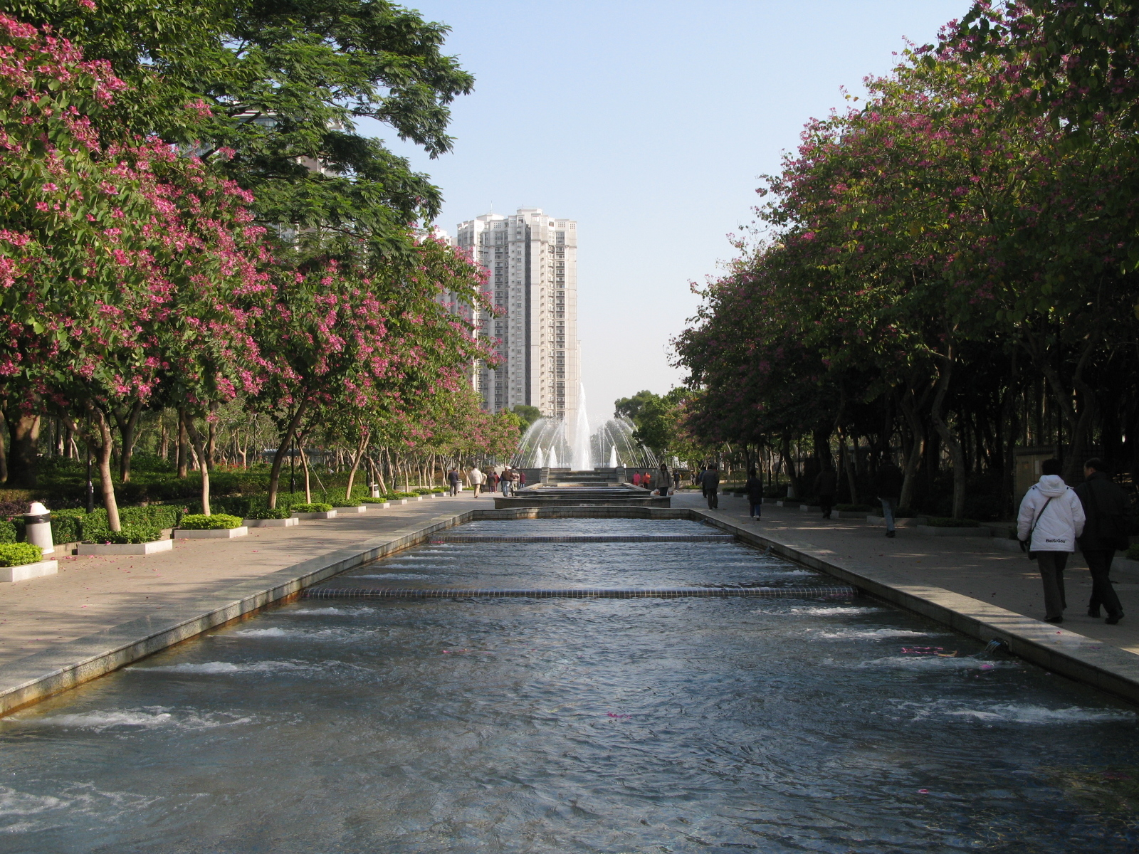 HK Tin Shui Wai Park Avenue